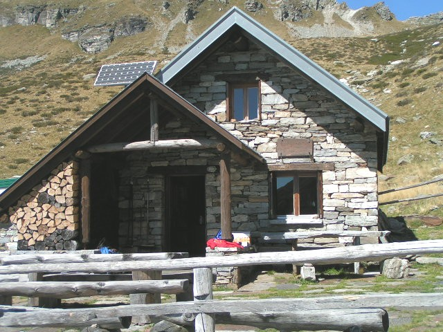 Capanna Borgna 1912 m Valle Verzasca Fota scattata da Elvezio